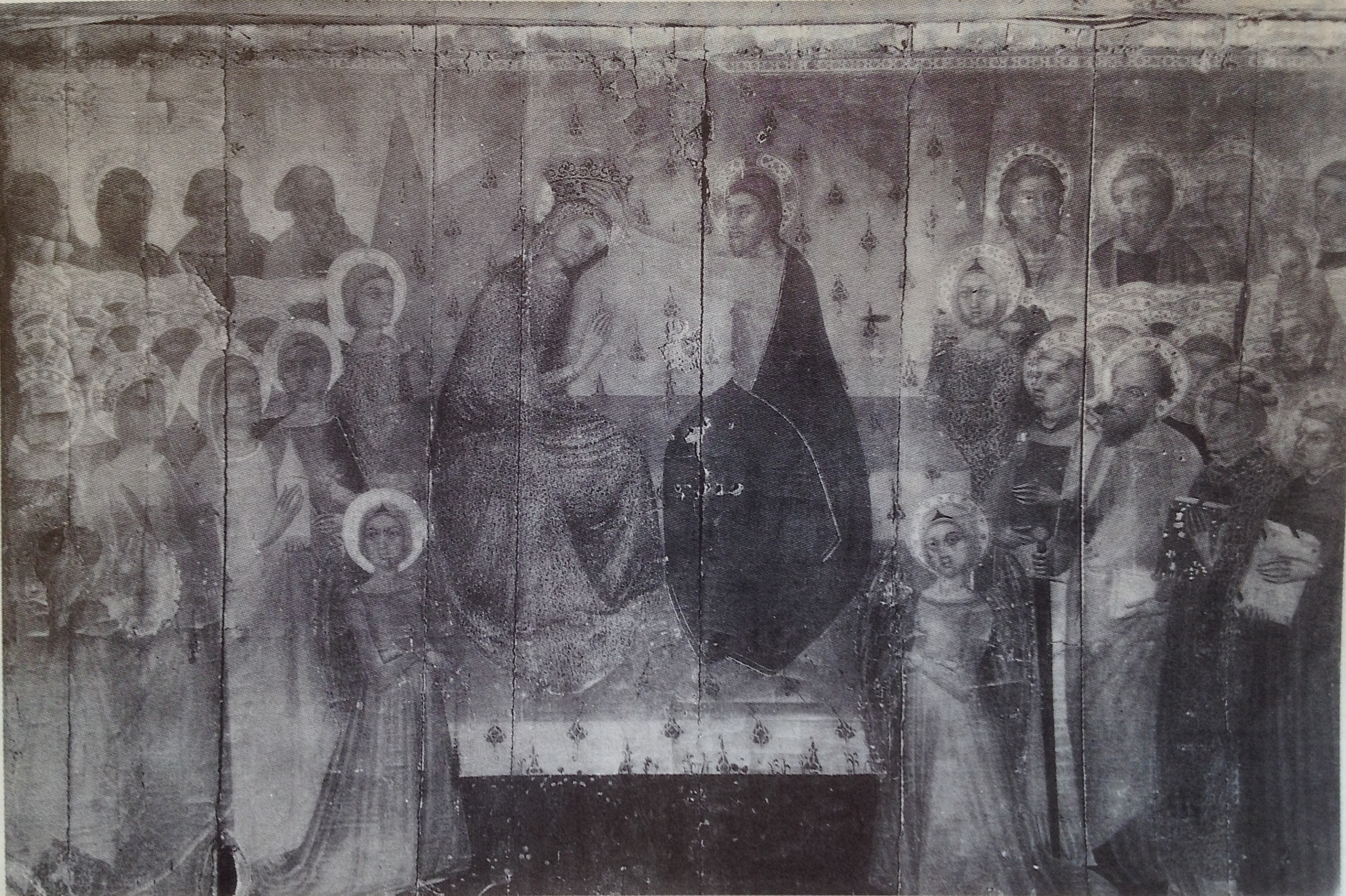 Coronació de la Mare de Déu de Bellpuig